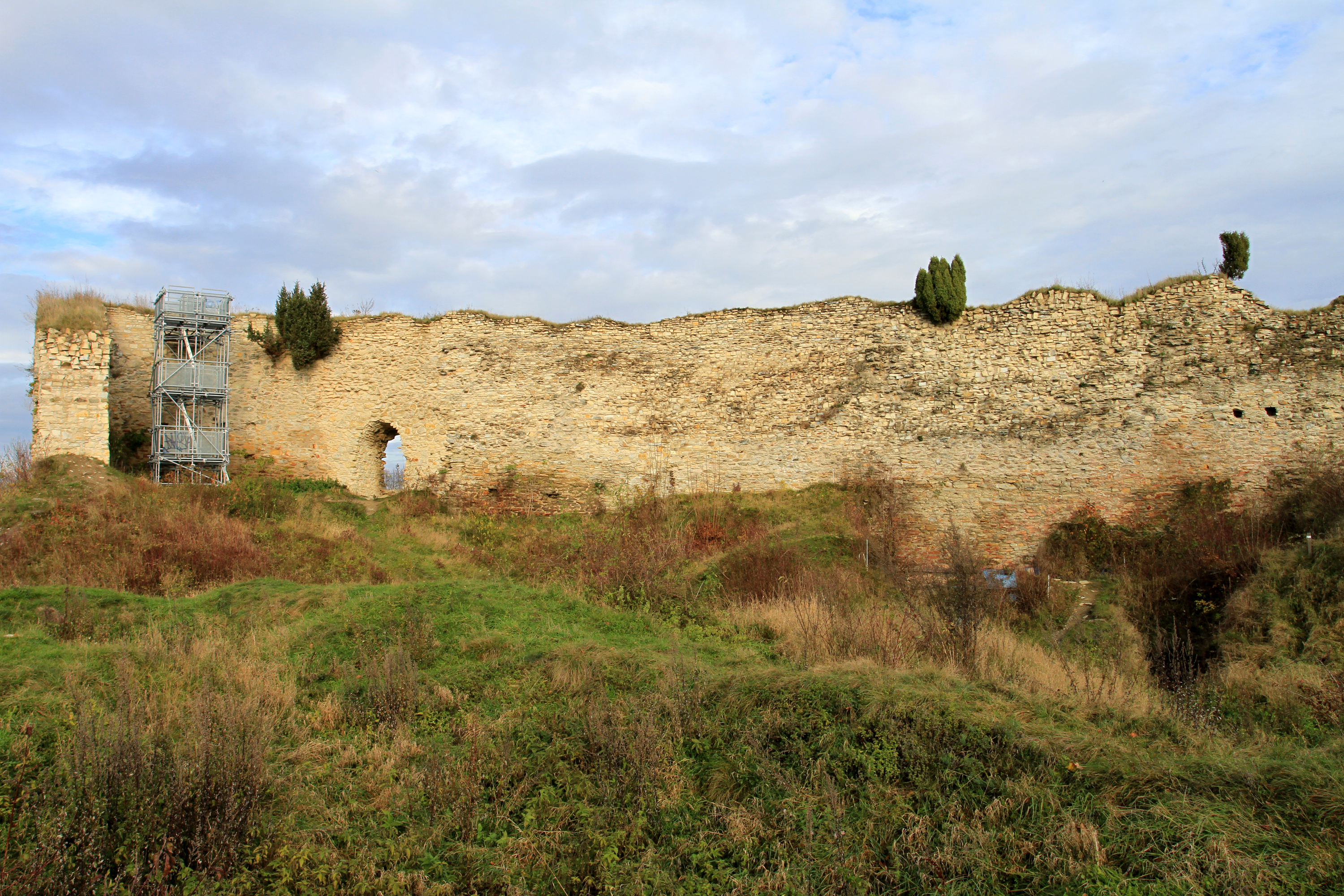 Hrad, zřícenina (Lanšperk), Lanšperk